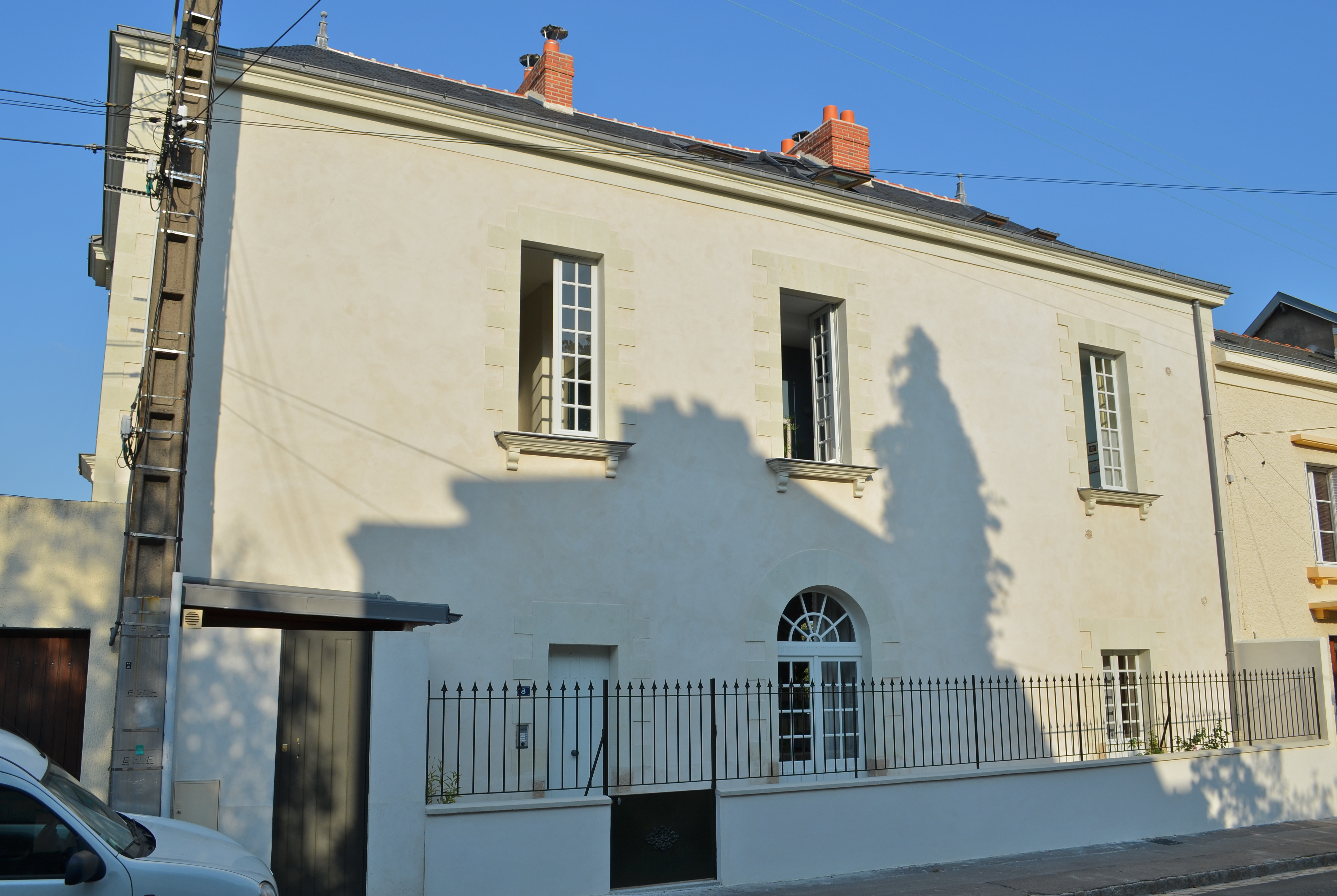 Maison bourgeoise de 1801. Nantes. .